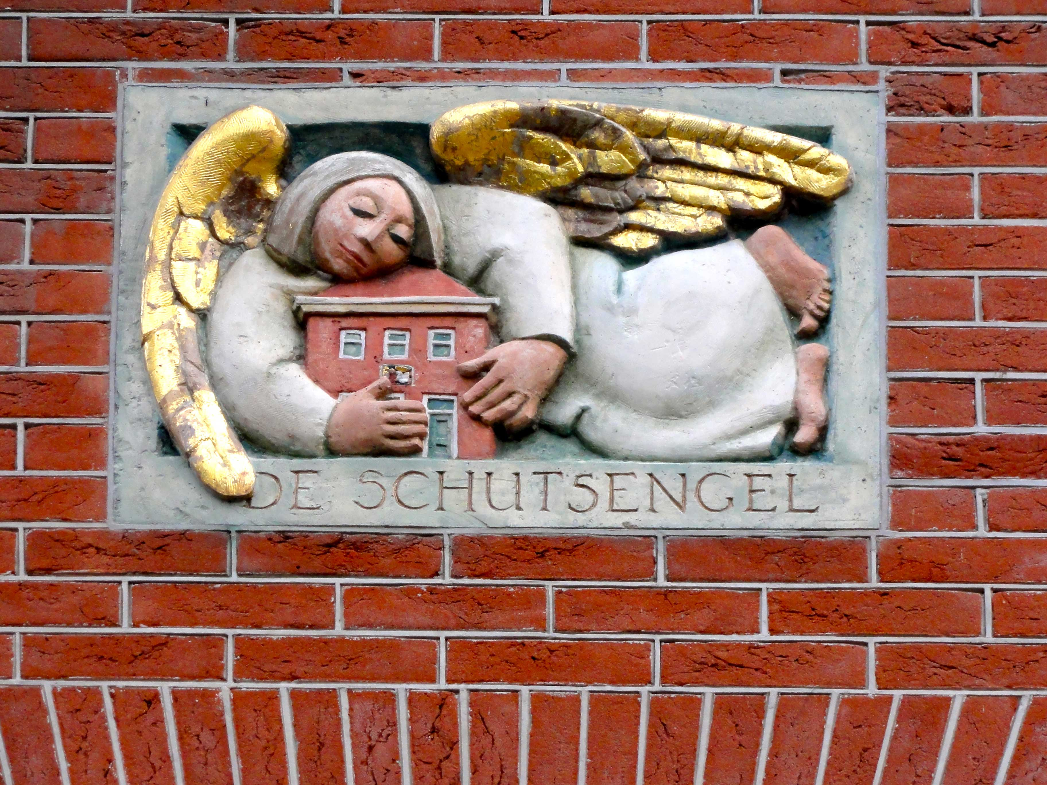 De Schutsengel, gevelsteen Fluwelenburgwal 4 Monnickendam